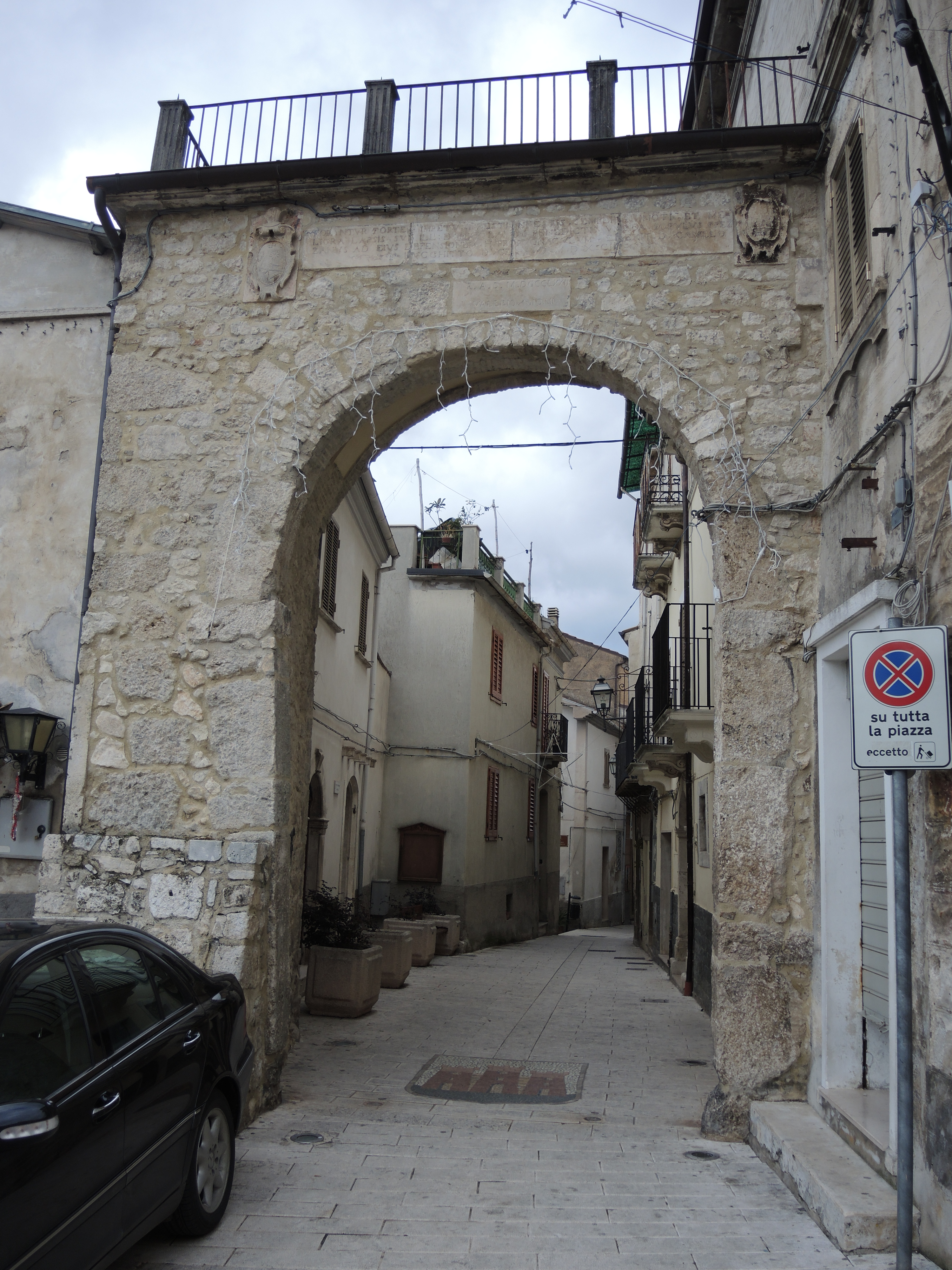 Prezza